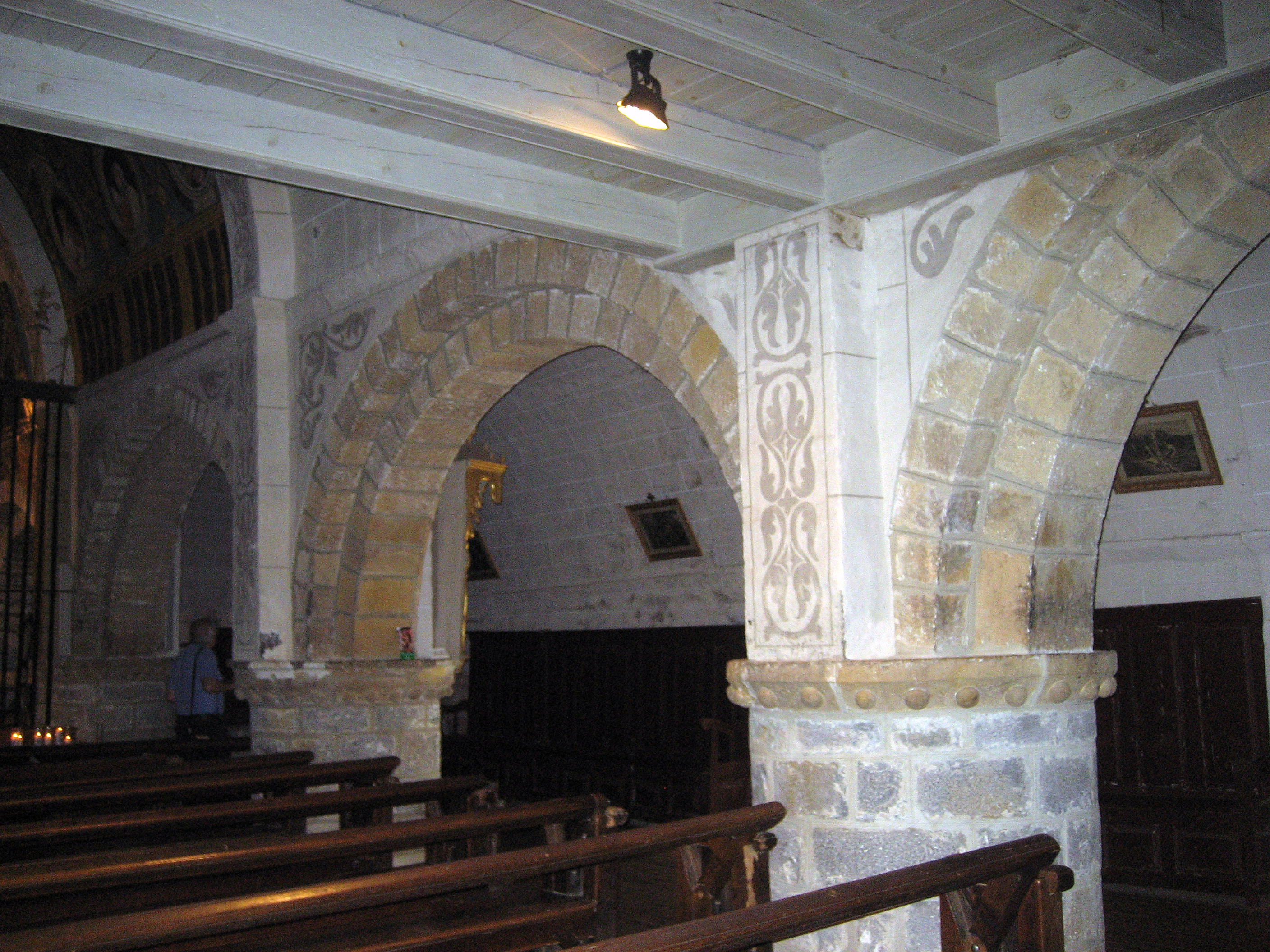 Interior de la Ermita de Muskilda en Ochagavía, Navarra (Spain)